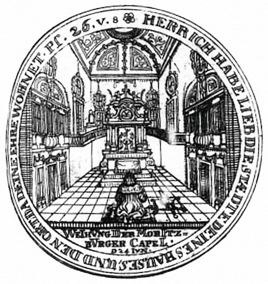 Motiv: Einweihung der Kapelle durch Kurfürst Johann Georg II. von Sachsen